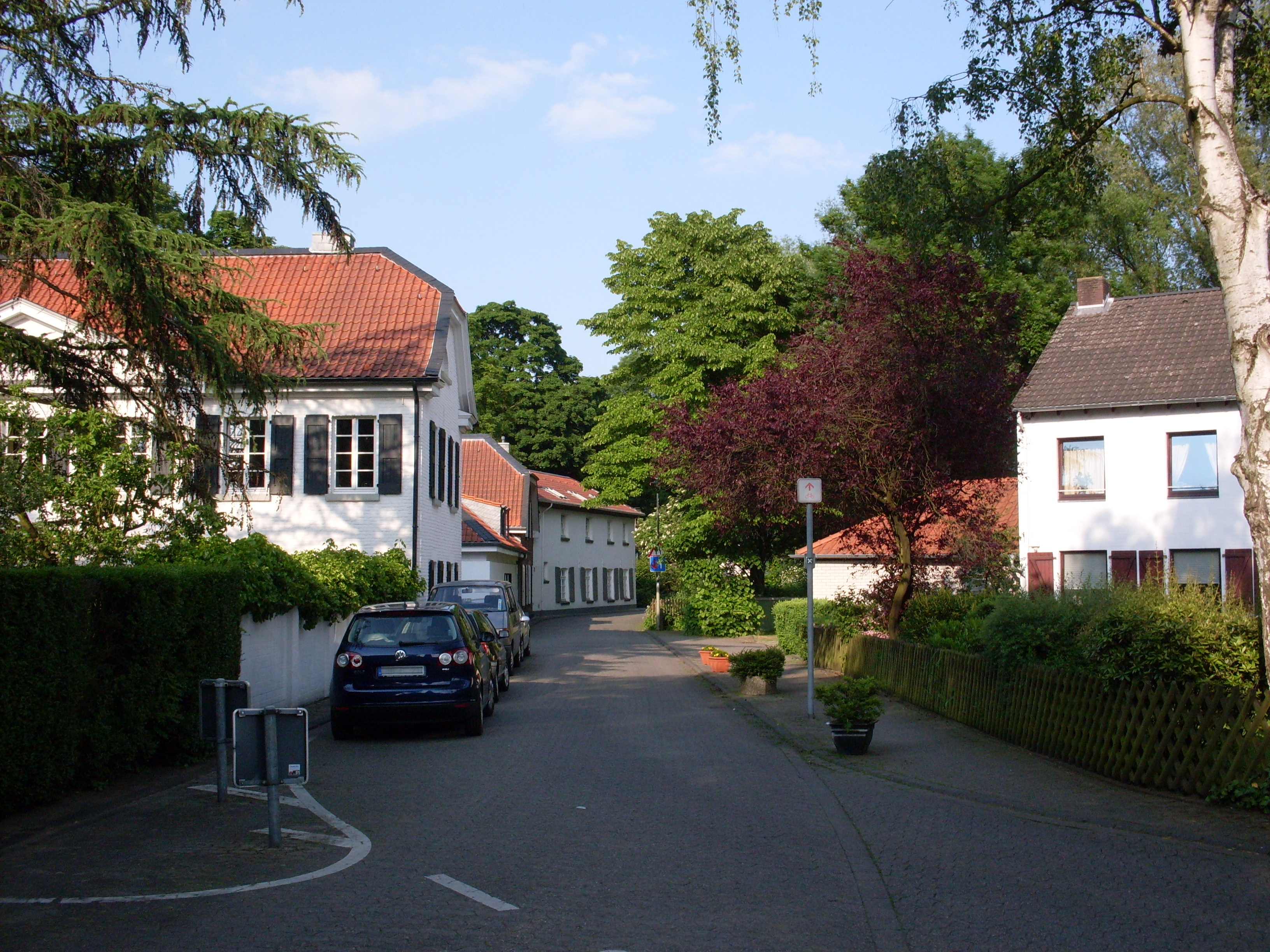 Düsseldorf-Kalkum Ortsmitte